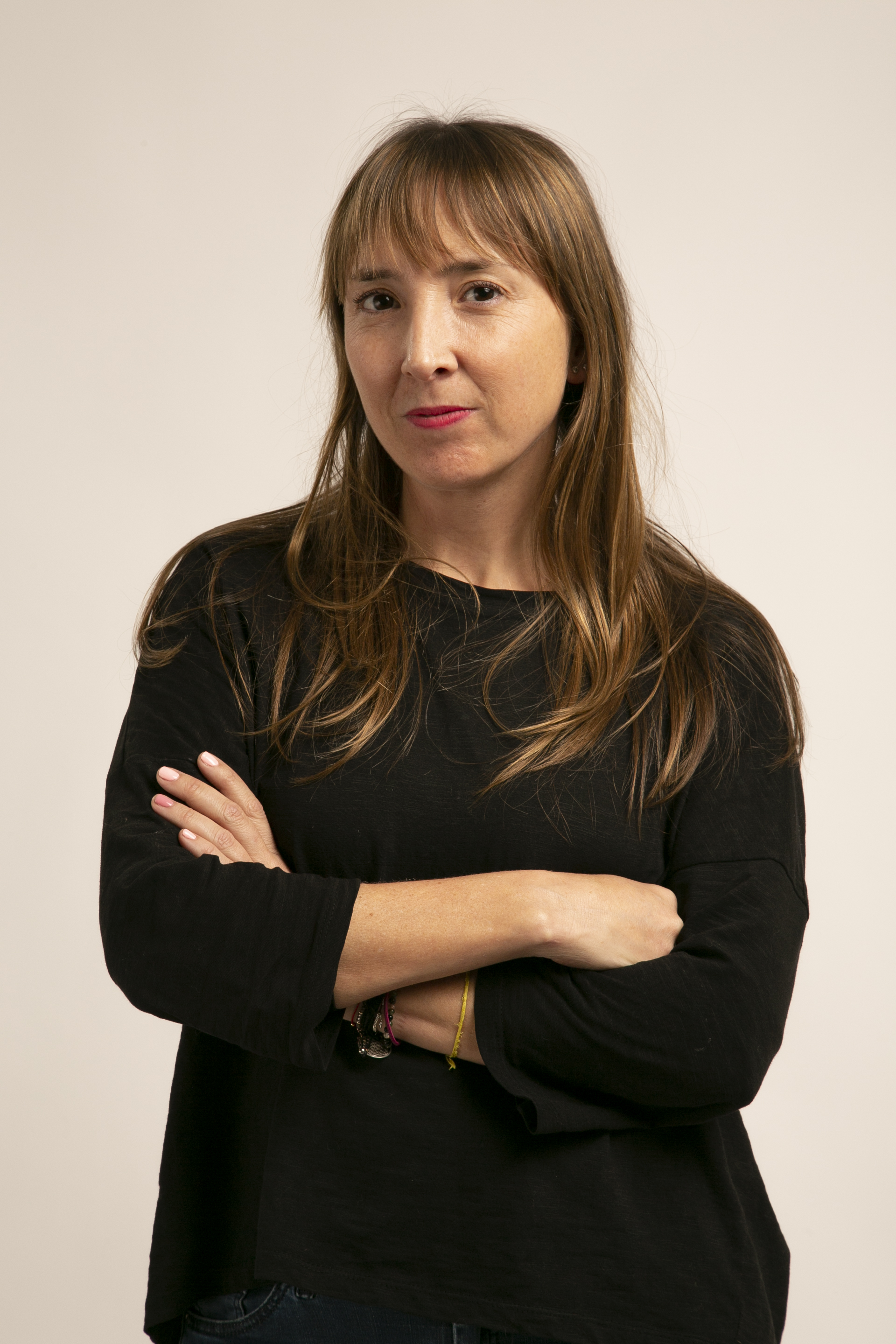 Macarena Cardone.